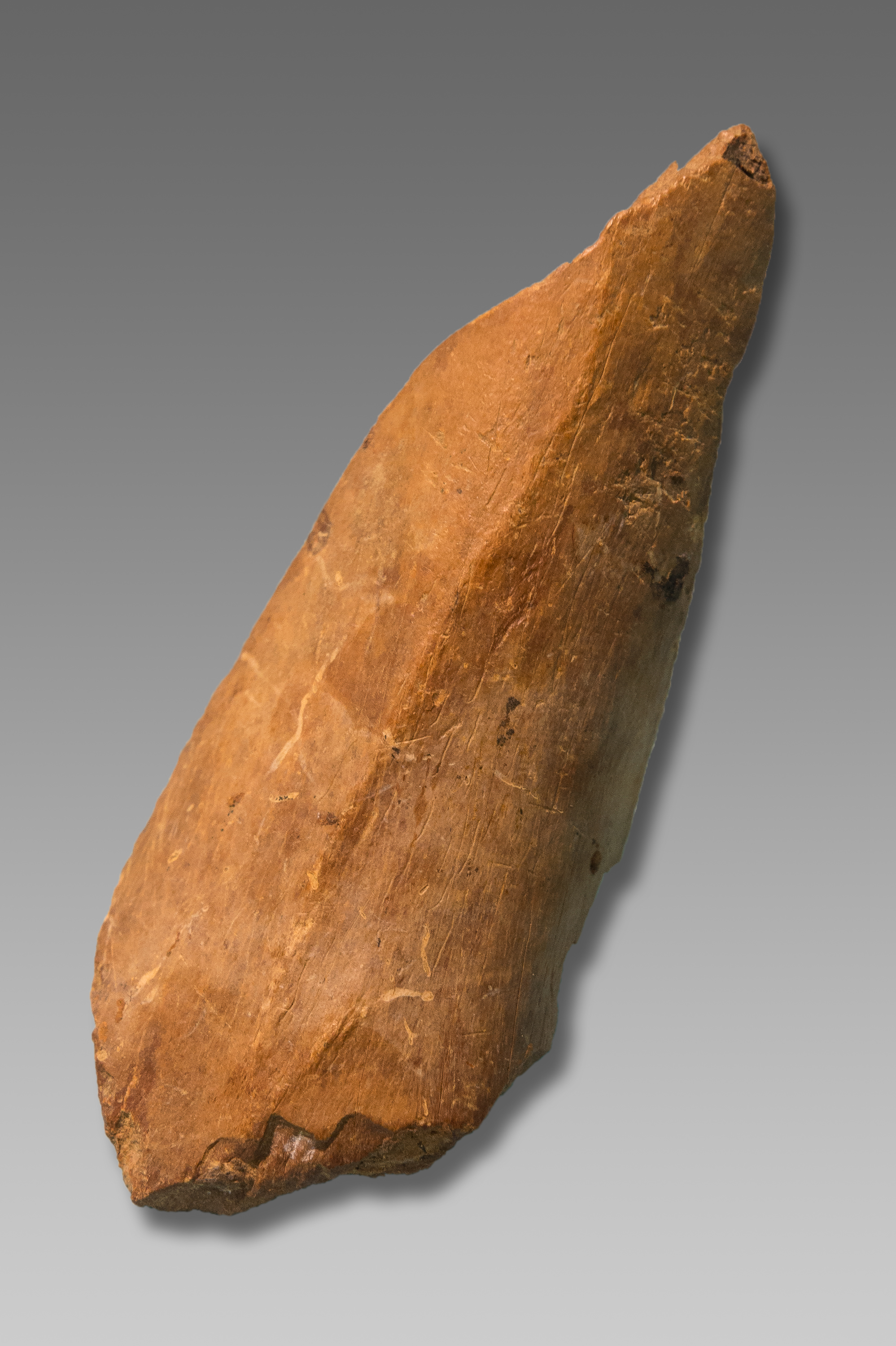 Retuscheur mit charakteristischem Narbenfeld, Kleine Feldhofer Grotte im Neandertal bei Erkrath, ausgestellt im Rheinischen Landesmuseum Bonn.